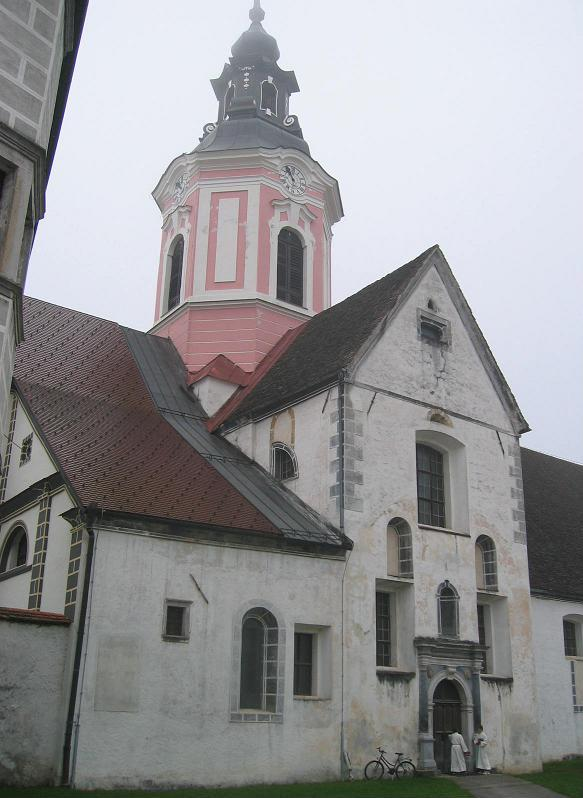 Monastery Sittich, Slovenia / samostan Stična, Slovenija / Kloster Sittich, Slowenien